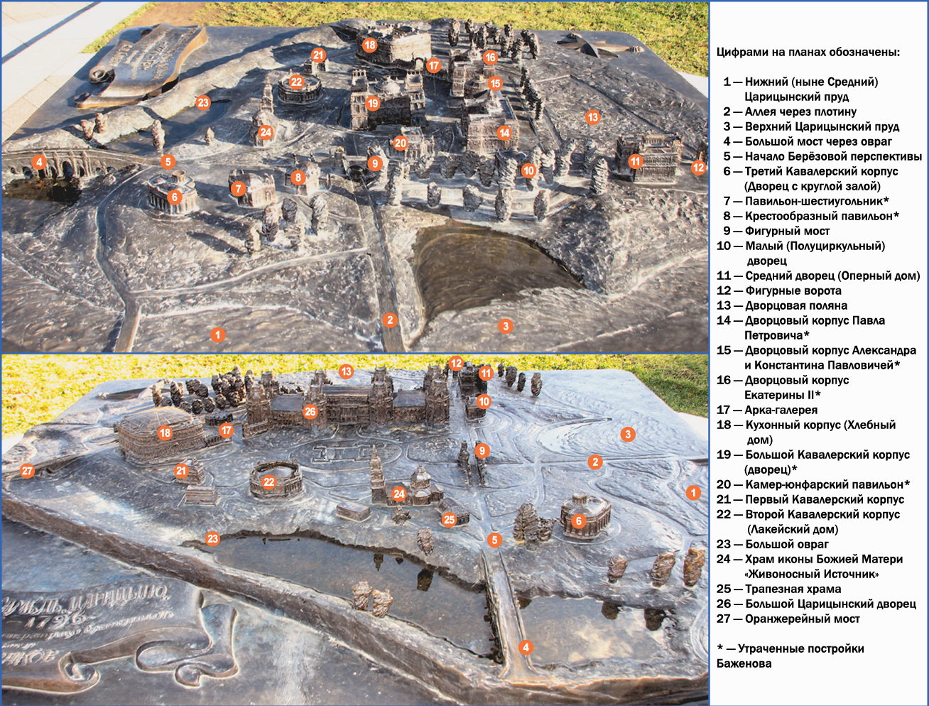 Схема объектов Царицынского ансамбля